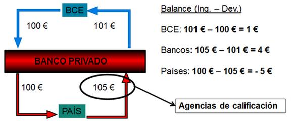 Ejemplo financiación de un país europeo con una tasa de interés por sus bonos del 5%, Plataforma Auditoría Ciudadana de la Deuda (PACD)